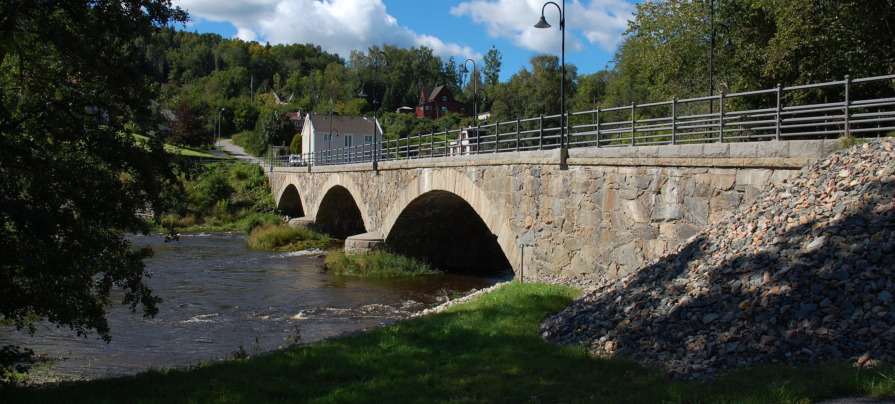 Kviströmsbrom över Örekilsälven, Munkedal